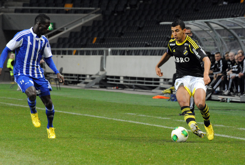 Demba Savage (HJK Helsinki) & Nabil Bahoui (AIK) 2013-03-24 AIK-HJK Helsingfors 2 - 1 Träningsmatch, Friends Arena